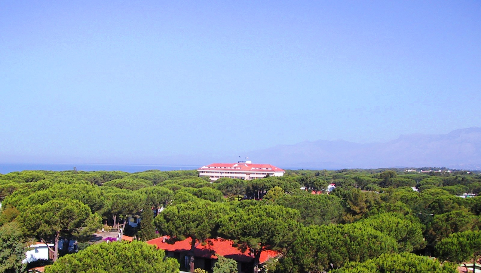 Baia Domizia località turistica balneare della Campania - Italia.